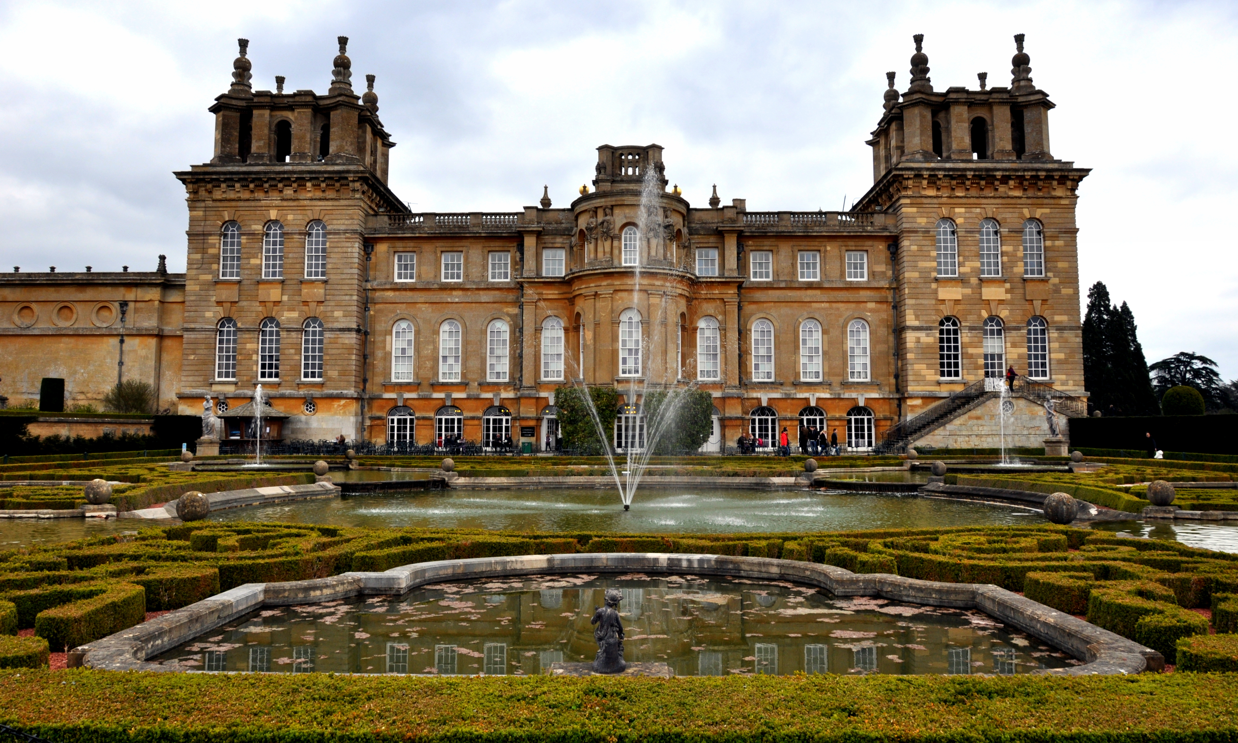 Blenheim Palace - West